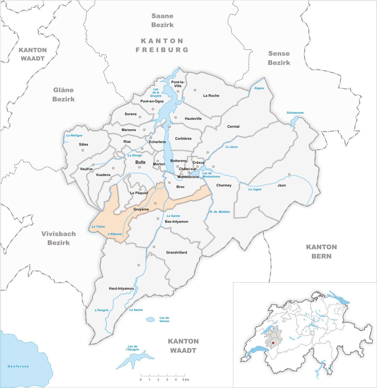 Municipality Gruyères